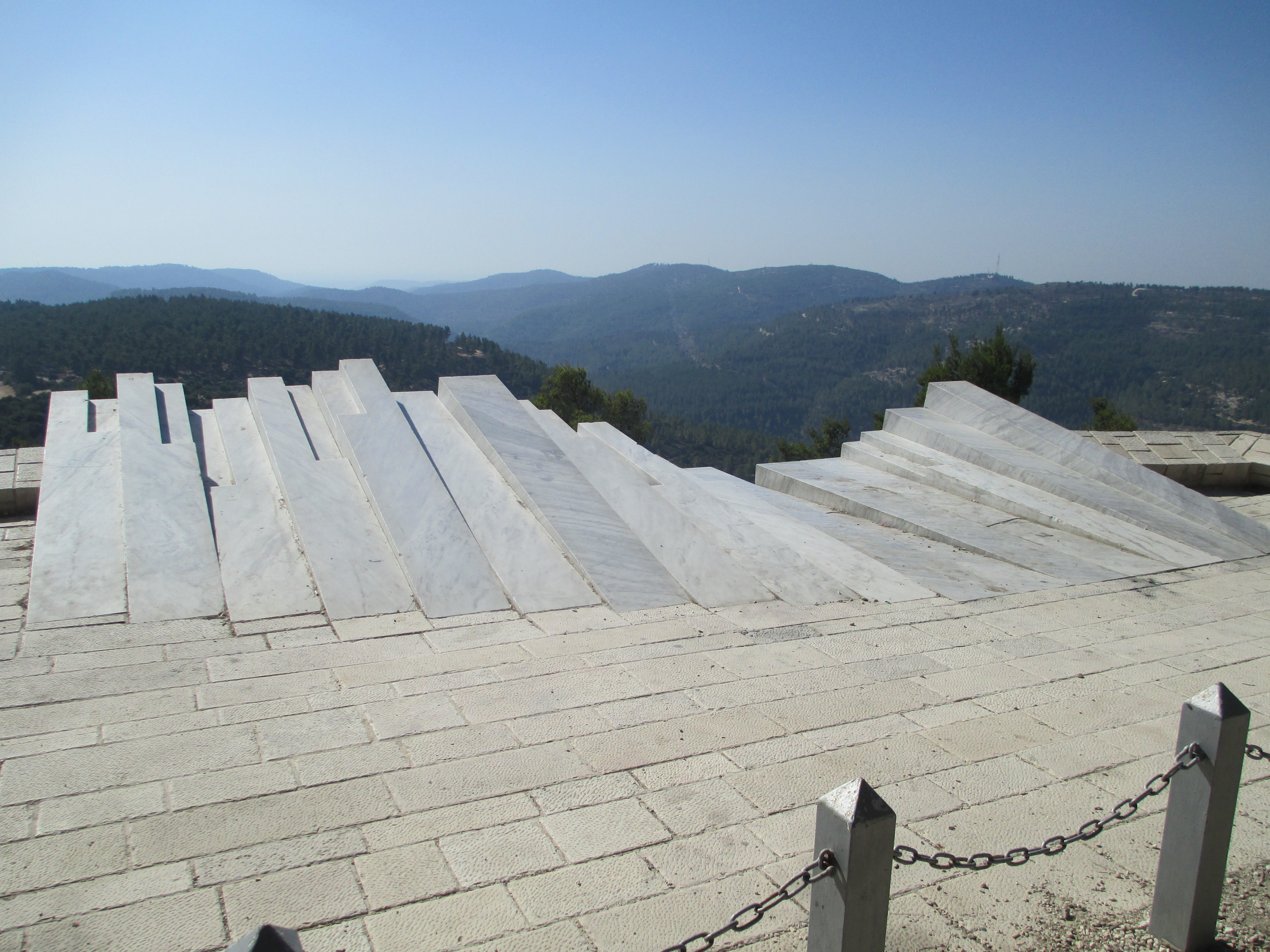 מצפור ארתור רובינשטיין